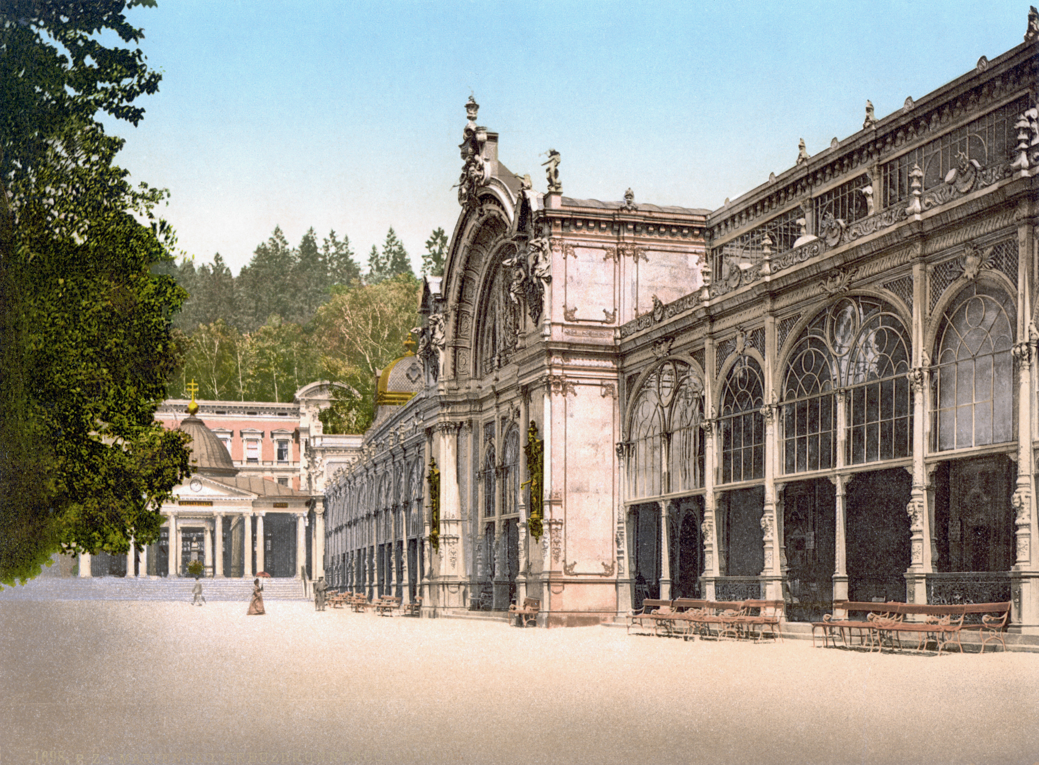 Marienbad Kreuzbrunnen um 1900